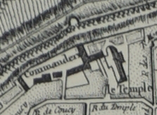 Extrait du plan Moithey